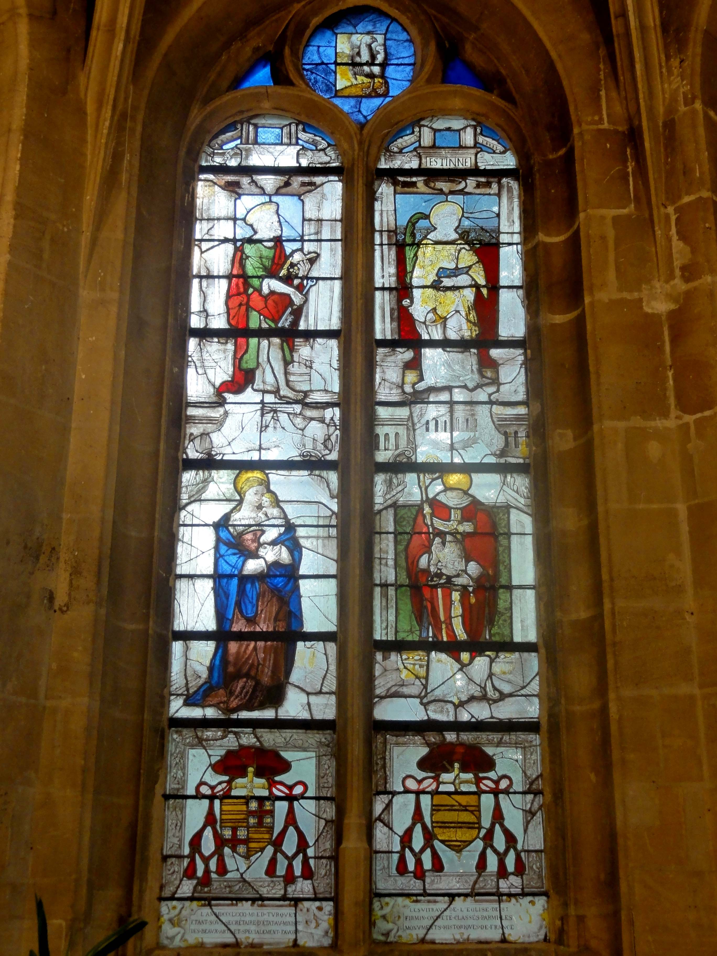 Verrière n° 1.